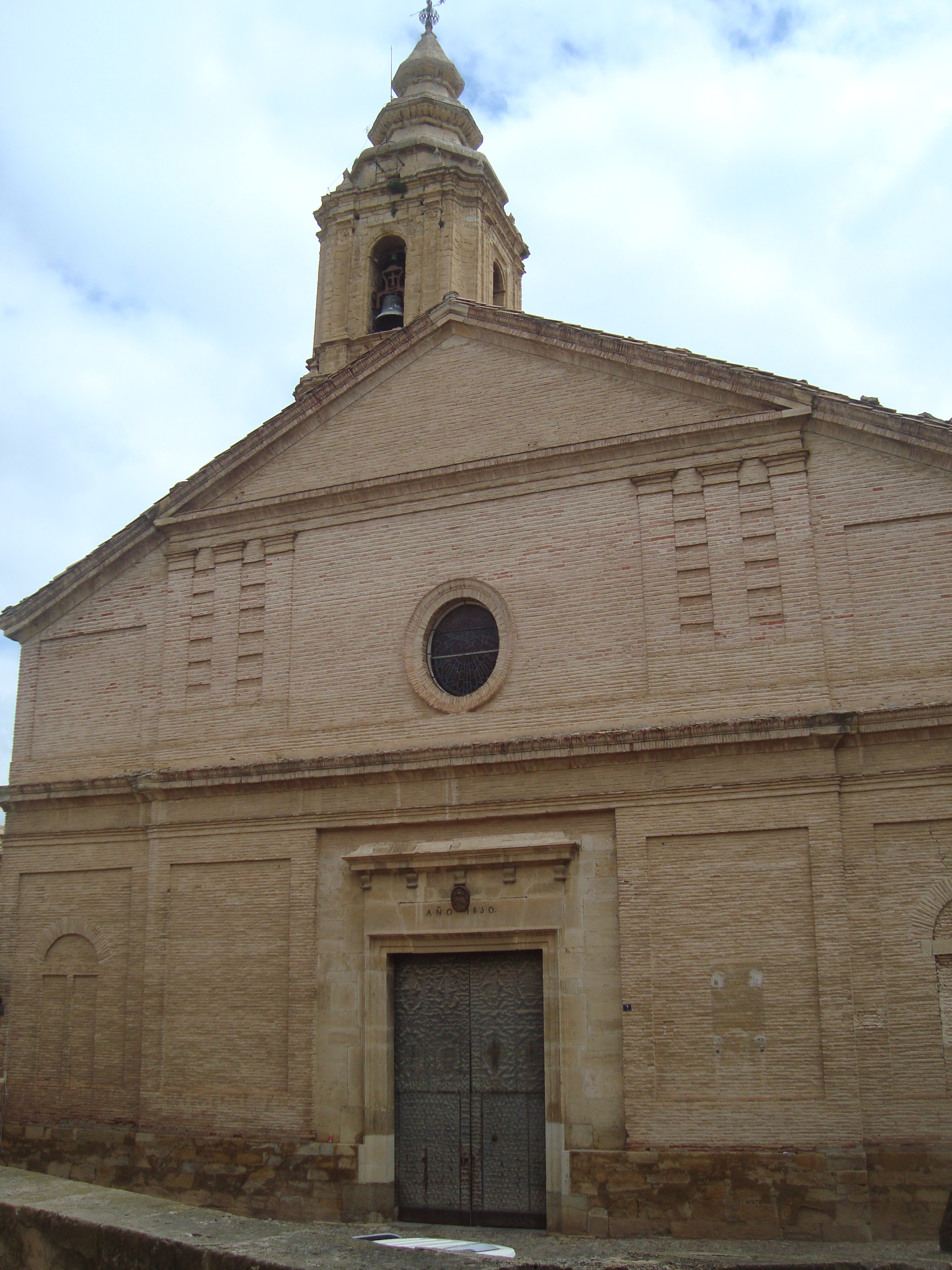 Església parroquial de l'Assumpció (Forcall) 01.061-007.